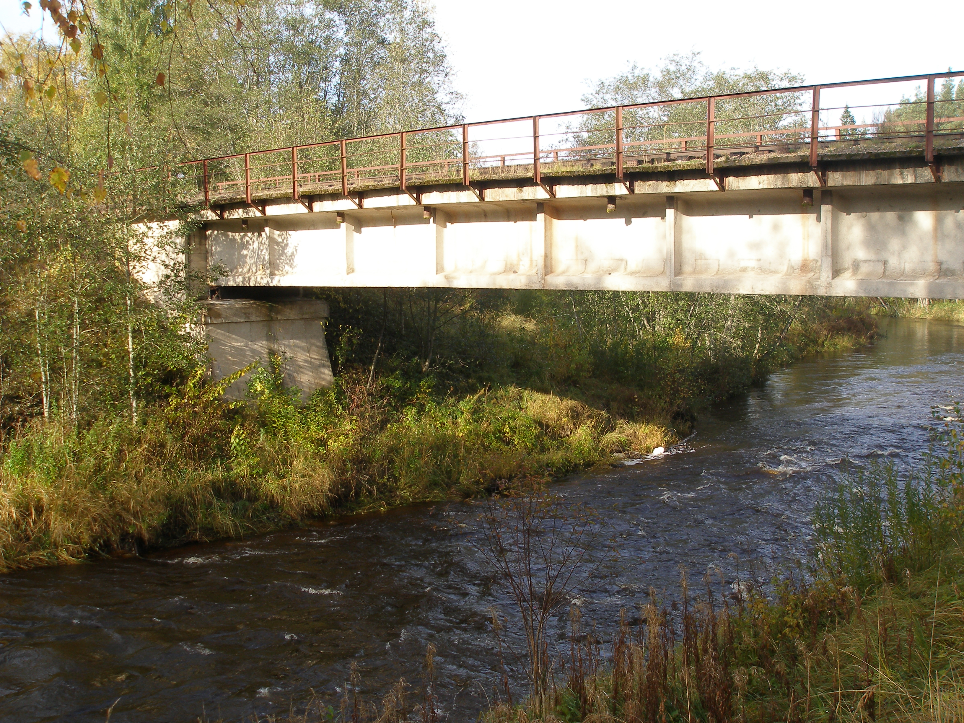 Dzelzceļa līnija Ieriķi - Abrene posmā Melturi - Amata. Tilts pār Amatas upi.